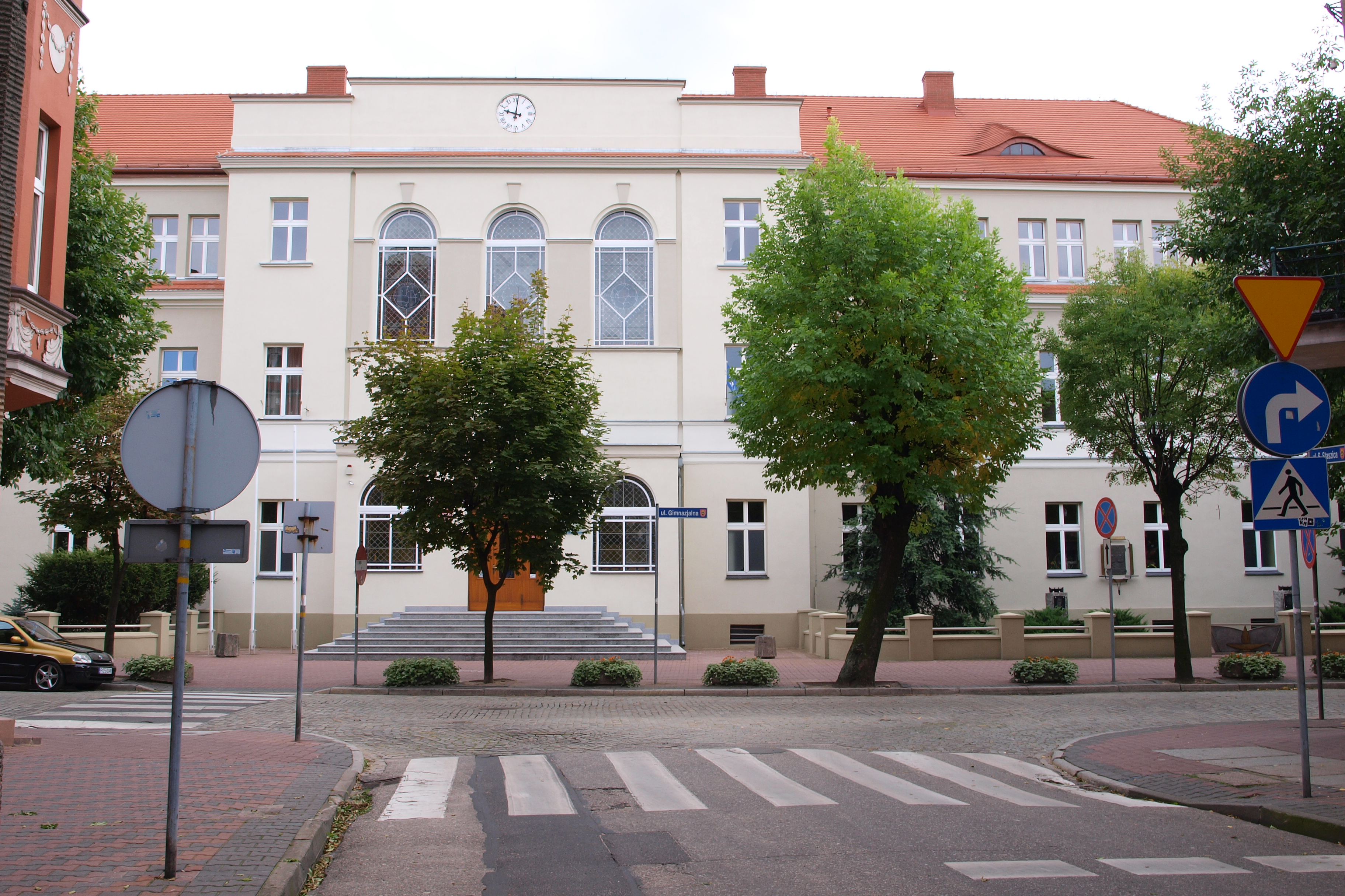 Ostrów Wielkopolski, ul. Gimnazjalna 9 - dawne gimnazjum męskie z 1845, 1925 r., obecnie I Liceum Ogólnokształcące im. Jana Kompałły i Wojciecha Lipskiego (zabytek nr 700/A)